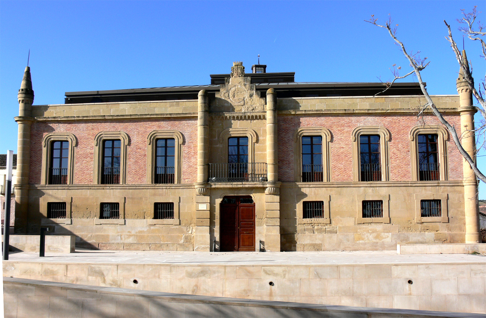 Palacio de los Condes de Hervías en Canillas de Rio Tuerto, La Rioja - España.